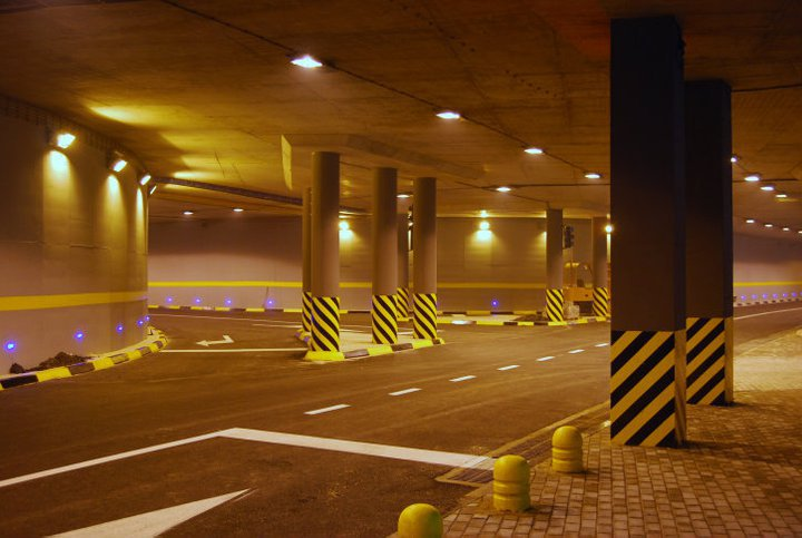 Подземен премин во Струммица